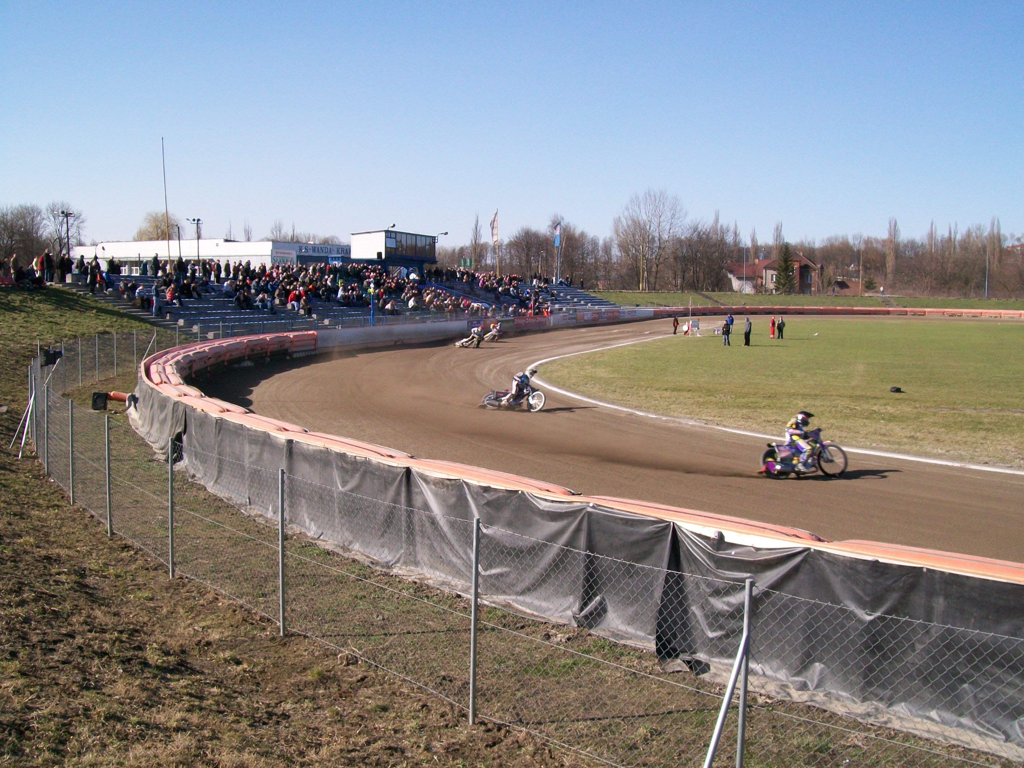 Zawody na stadionie Wandy w 2011 roku